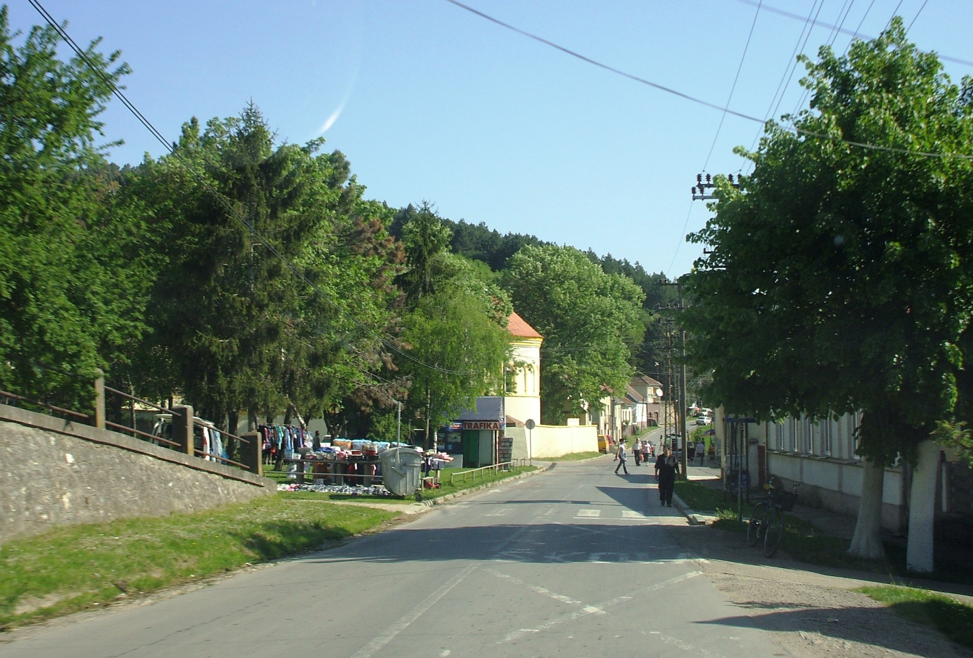 Средиште Лежимира.